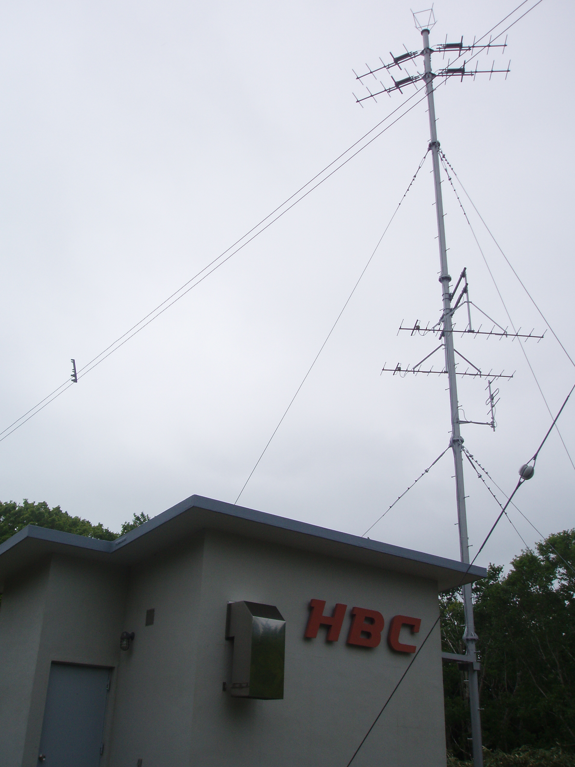 黒松内中継局 HBC送信設備